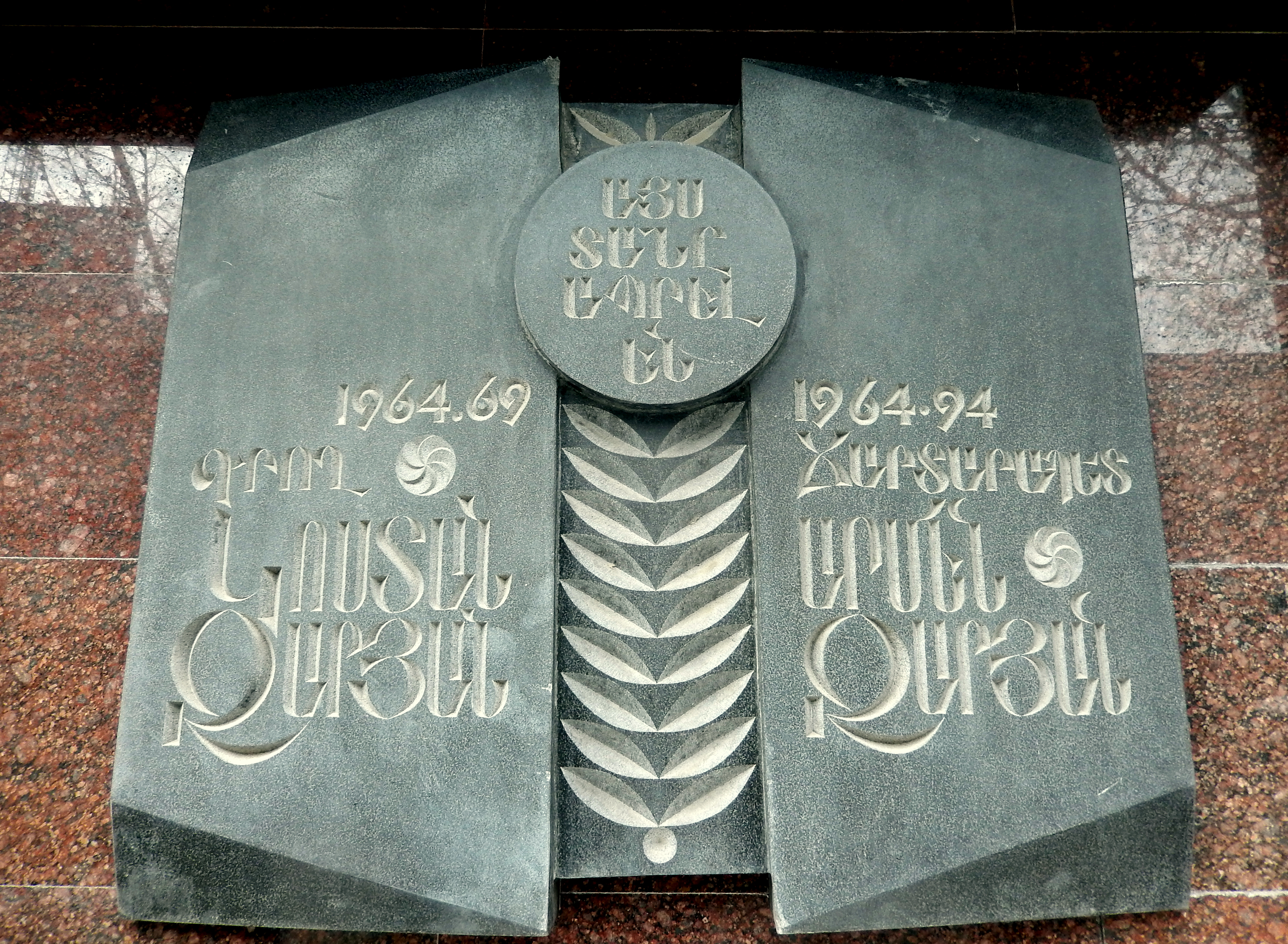 Կոստան և Արմեն Զարյանների հուշատախտակը Երևանի Աբովյան փողոցում